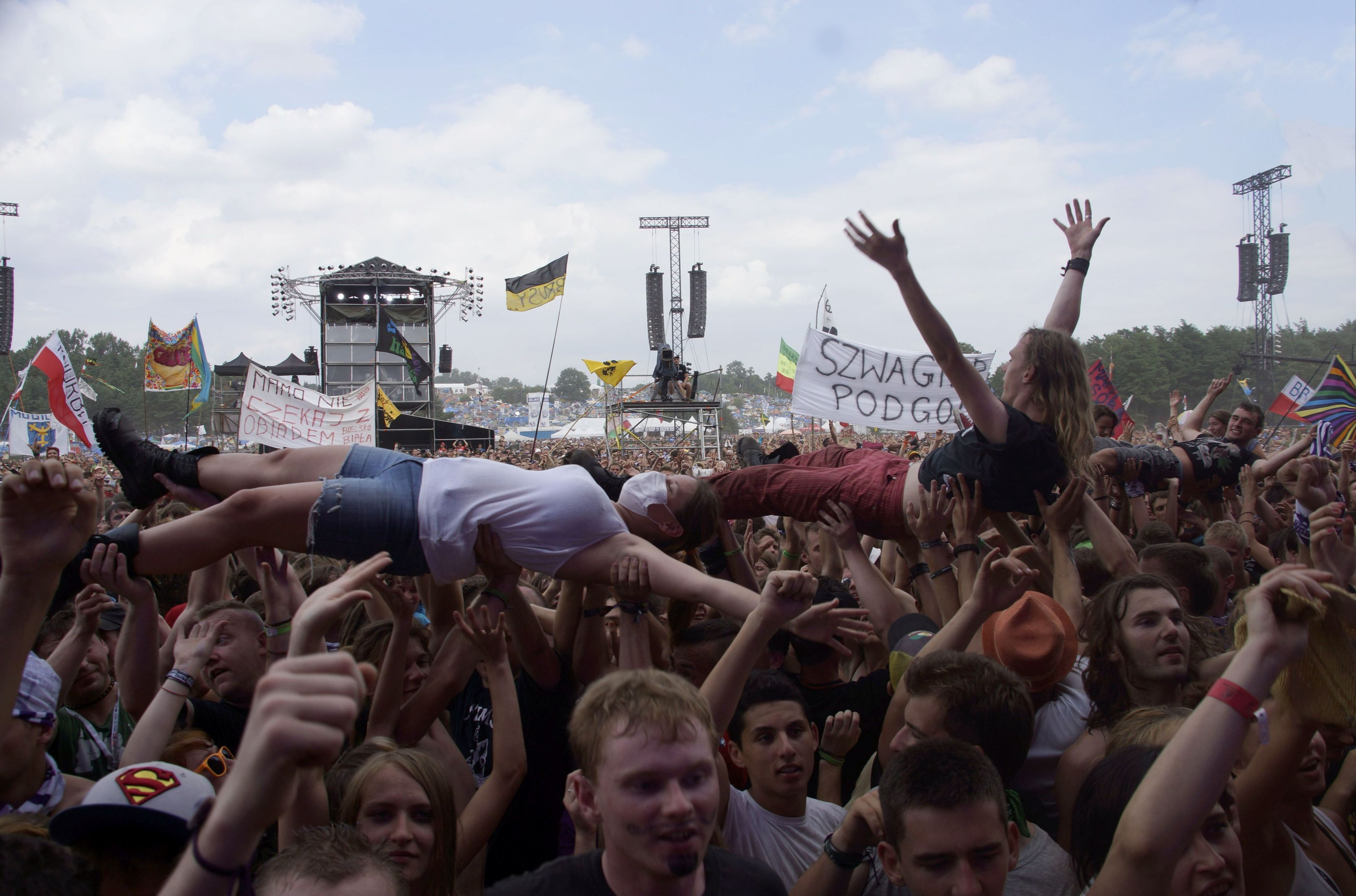 Przystanek Woodstock 2013